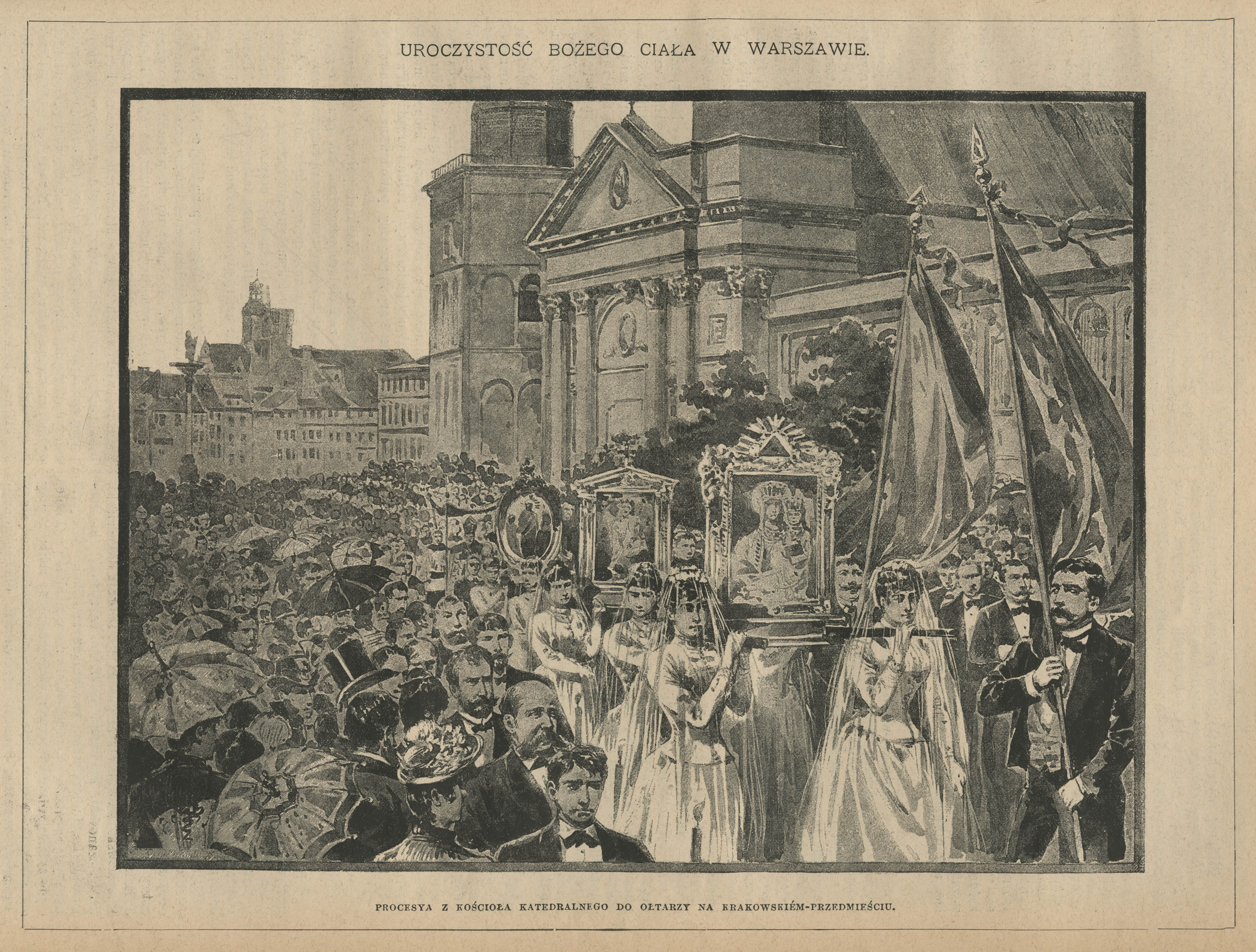 Uroczystość Bożego Ciała w Warszawie. Procesja z kościoła katedralnego do ołtarzy na Krakowskim Przedmieściu